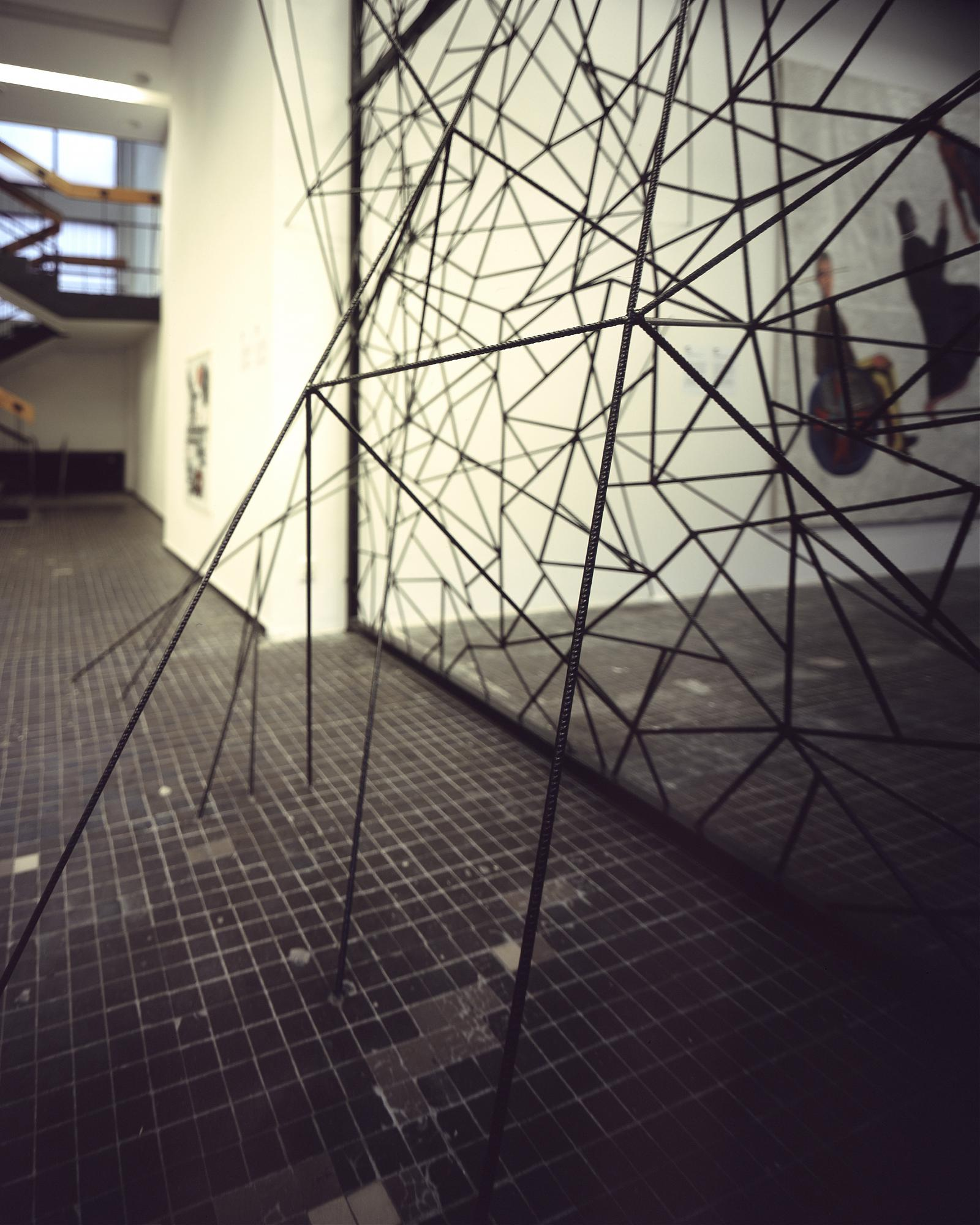 Rzeźba Moniki Sosnowskiej powstała w odniesieniu do lokalnej, polskiej tradycji rzeźby w przestrzeni publicznej (metaloplastyka, spawane struktury na placach zabaw i ogrodach etc.), co jest konsekwencją zainteresowań artystki modernistycznym dziedzictwem, ale także budowlanymi pomyłkami i amatorskim, oddolnym kształtowaniem przestrzeni wspólnej i prywatnej przez mieszkańców osiedli z wielkiej płyty. Rzeźba Sosnowskiej to zainstalowana bezpośrednio na ziemi kula „ulepiona” z ornamentalnie ukształtowanych prętów zbrojeniowych. Powstała jako rezultat obserwacji kształtów i wzorów krat montowanych przez mieszkańców Bródna, które zabezpieczają mieszkania na parterze, kioski i sklepy przed włamaniem.